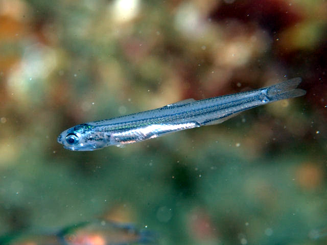 カタクチイワシ Engraulis japonica